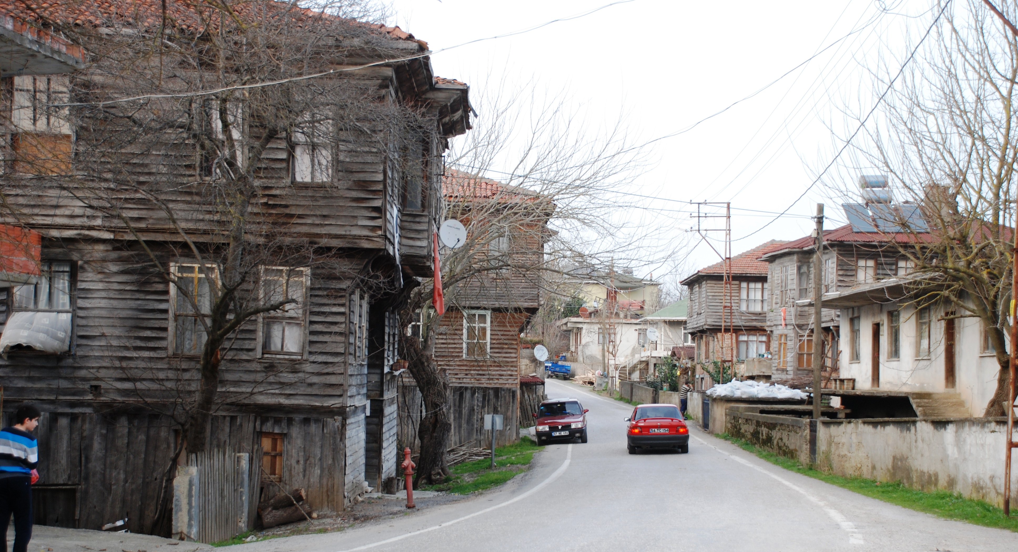 Paşalar köyü içinden geçen Akçakoca-Kocaali devlet yolu.